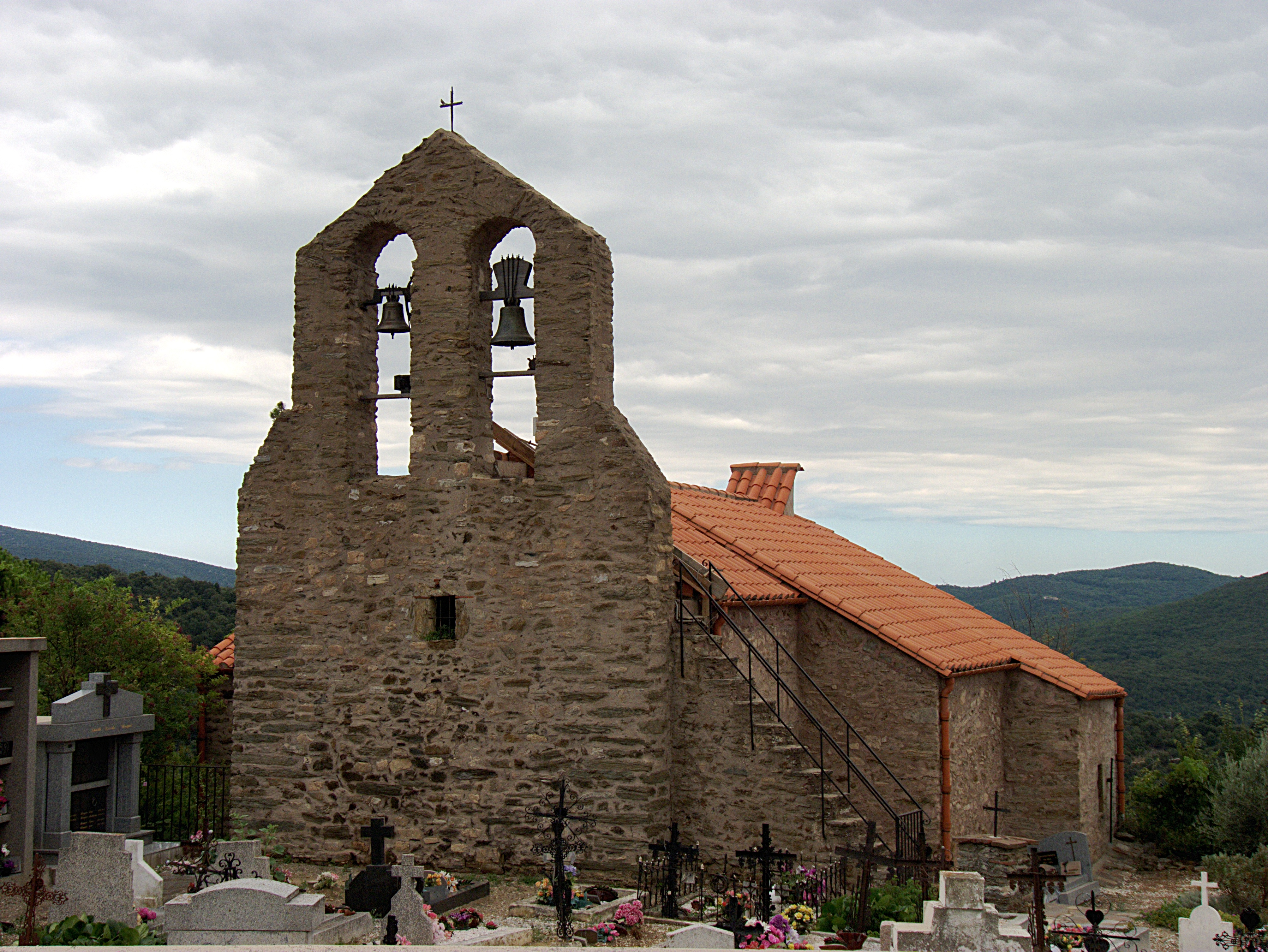 Église paroissiale Saint-Jean L'Évangéliste (XVIIe siècle), Taulis (Pyrénées-Orientales, Languedoc-Roussillon, France)